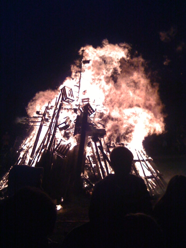 Sonnwendfeuer in Nürtingen-Reudern, Baden-Württemberg, Deutschland.